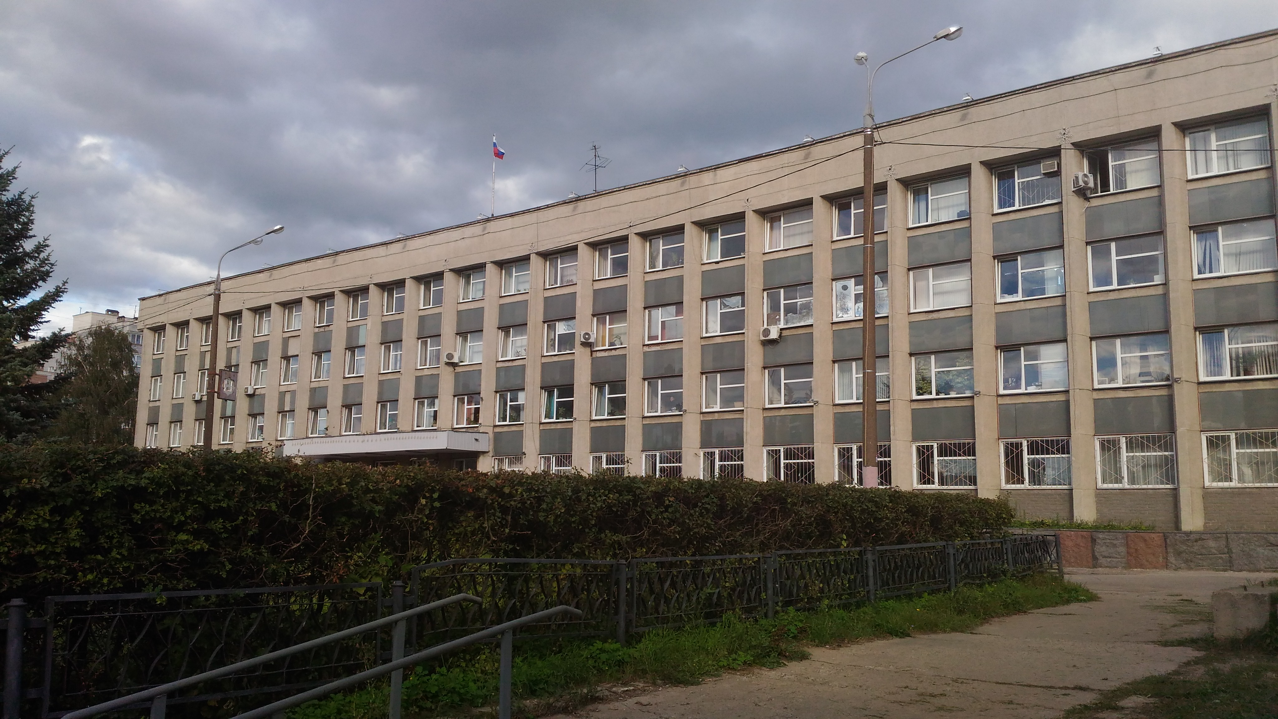 Нижний Новгород. Администрация Московского района